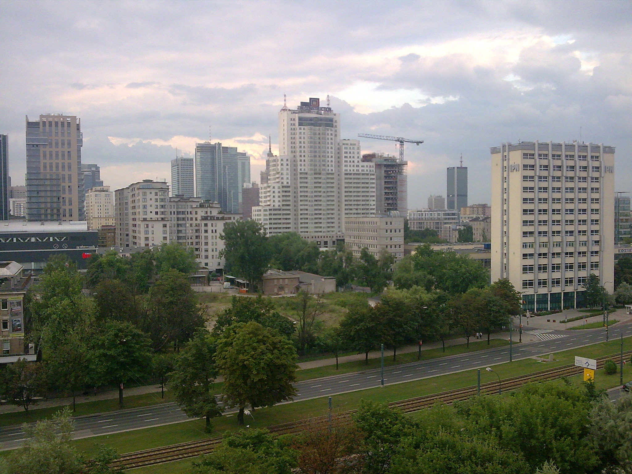 Wola i Śródmieście - drapacze chmur